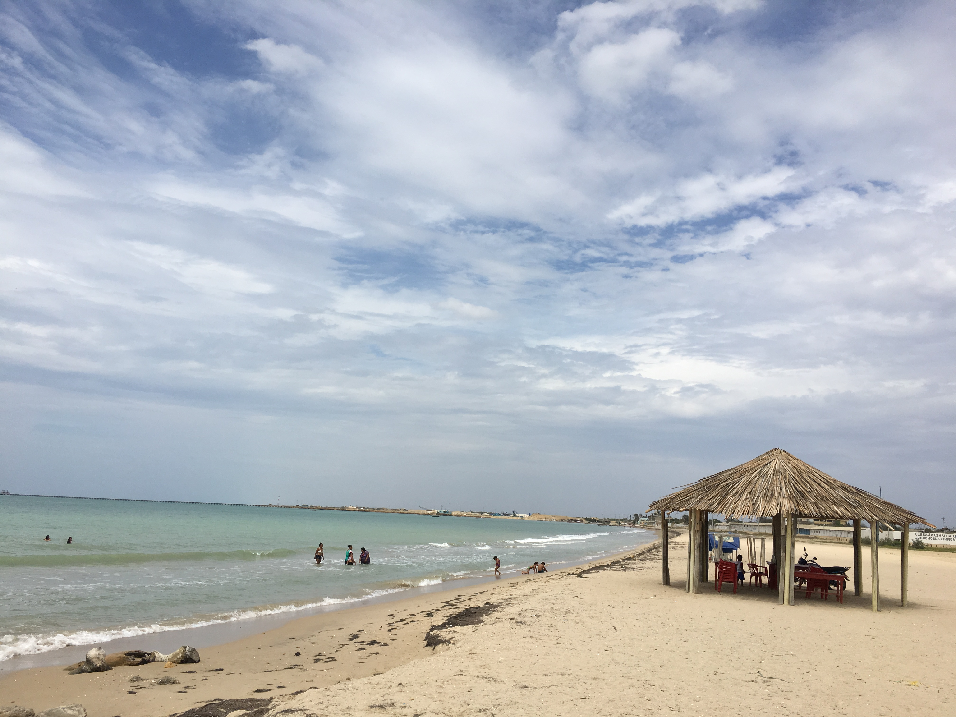 Sector de playas en las Salinas de Manaure en el departamento de La Guajira Colombia.